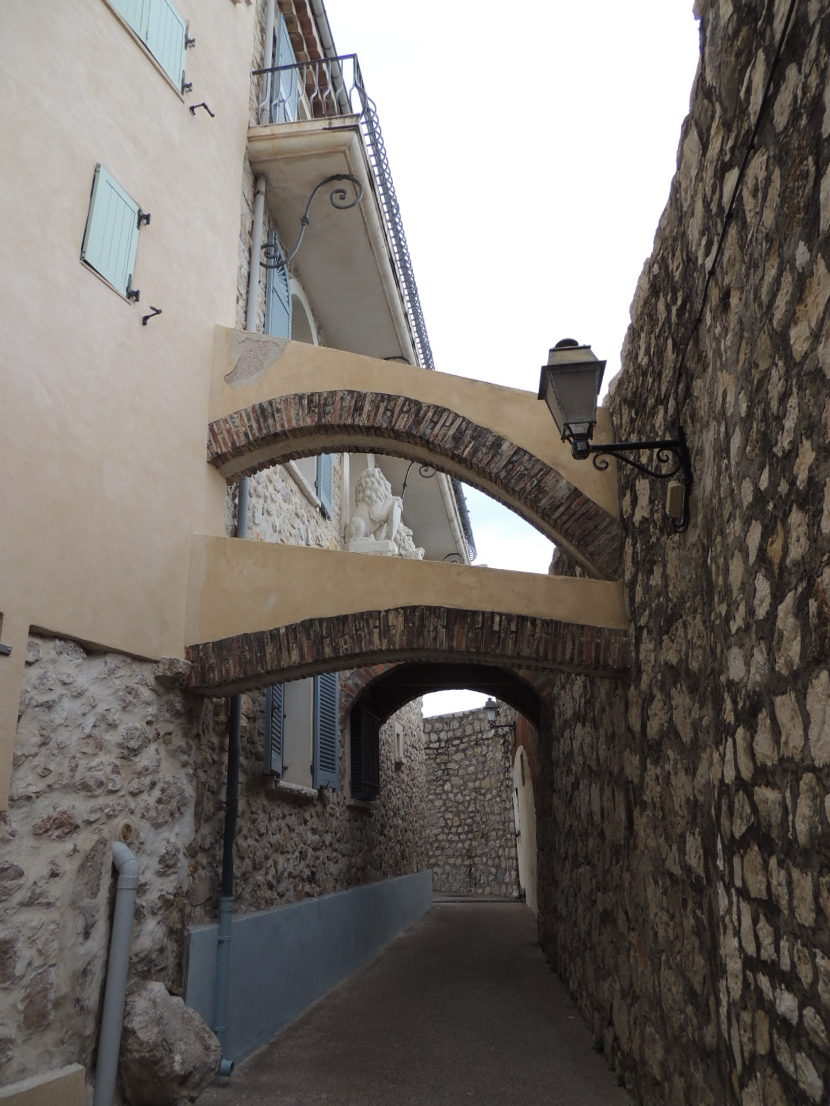 antibes vieille rue